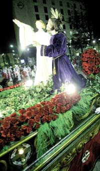 El paso de La Oración del Huerto (s.XIX) la noche de Martes Santo en Soria. Al fondo, la Cofradía de La Flagelación espera su paso.